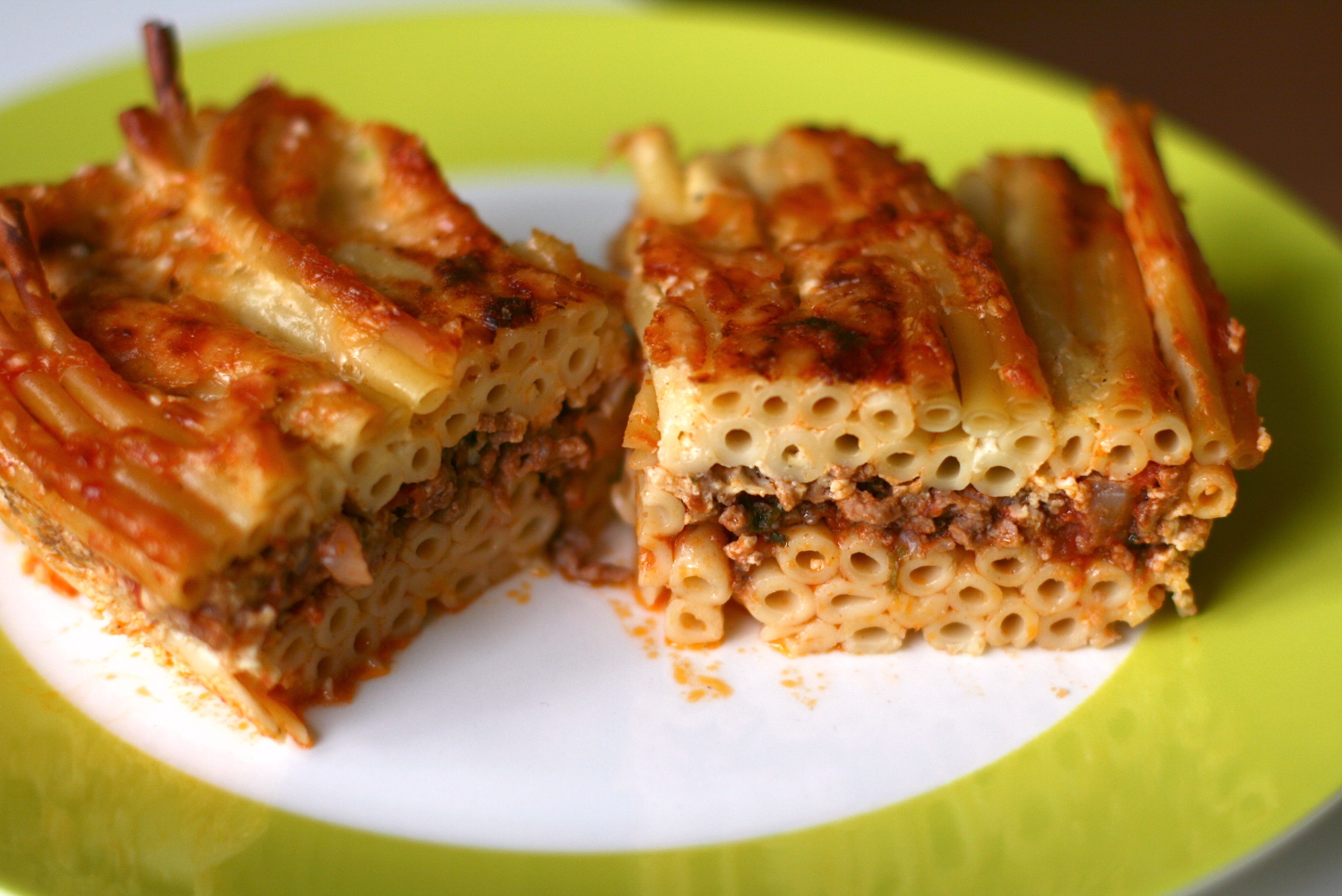 Greek pastitsio